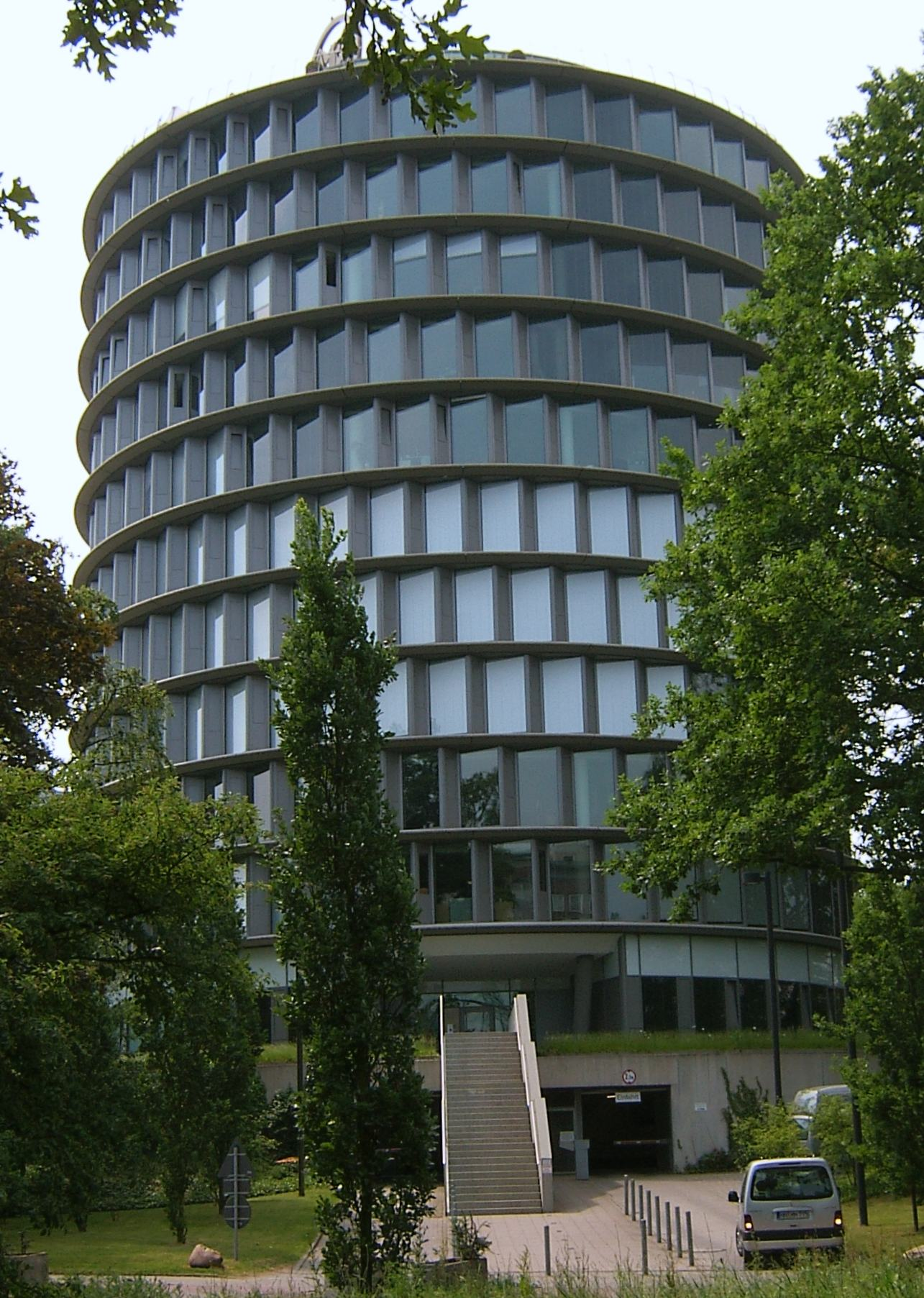 Hamburg, Winterhude, Hauptverwaltung